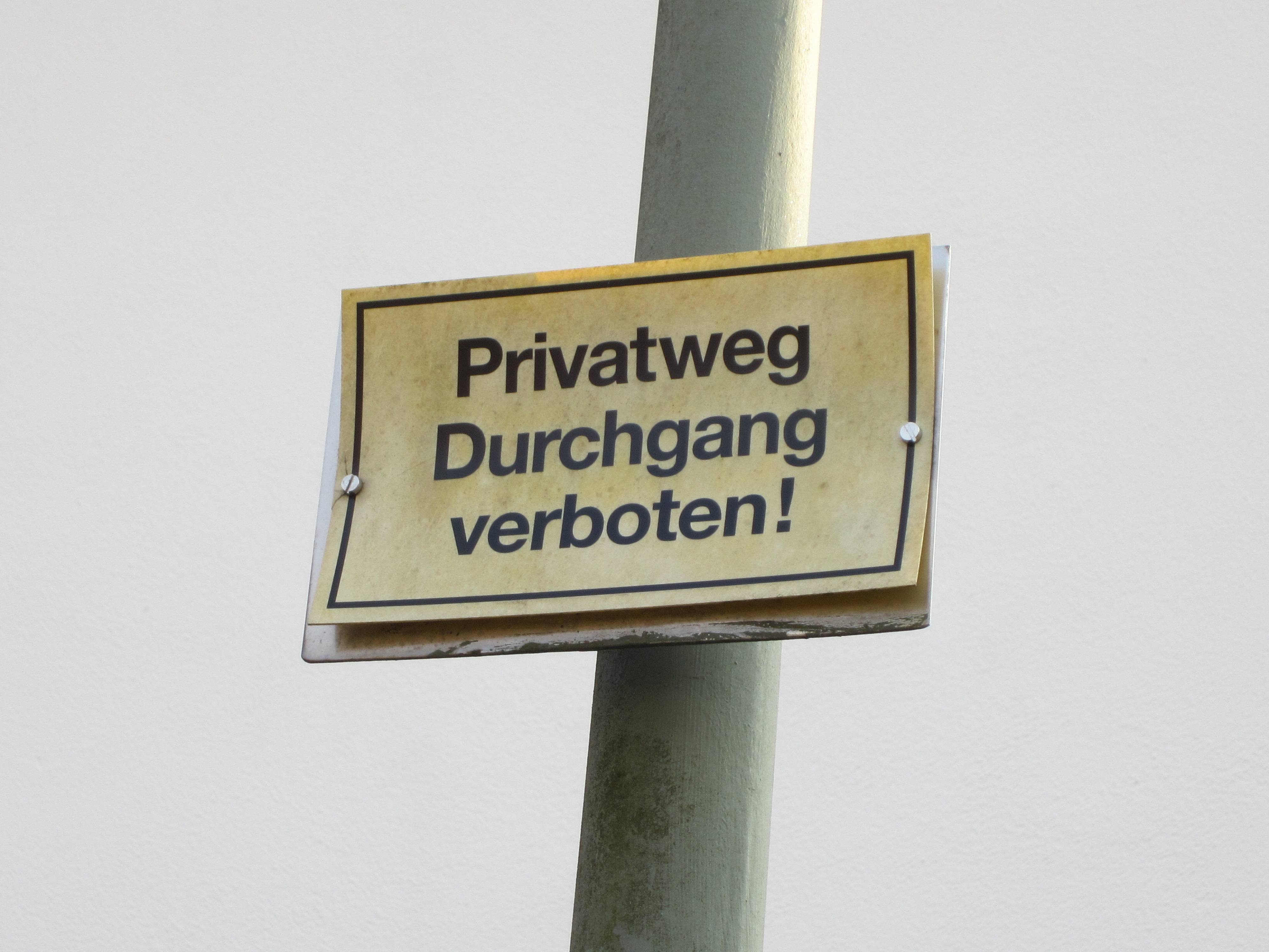 Ein Privatweg-Schild in Moosburg an der Isar.